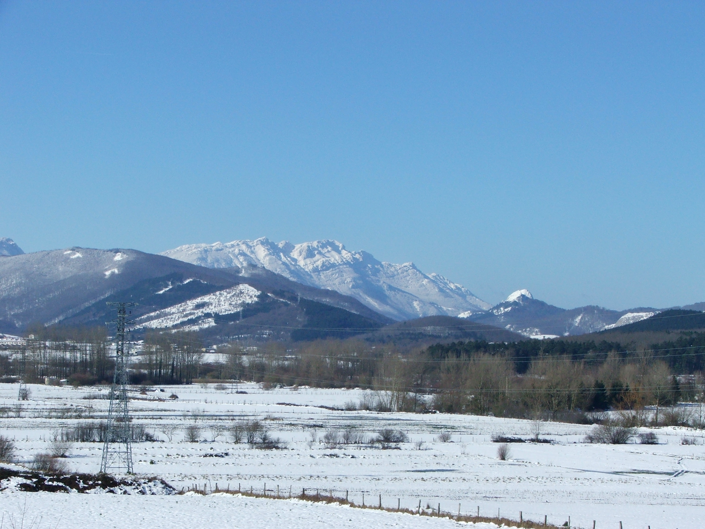 Tontorsoro in Altsasu